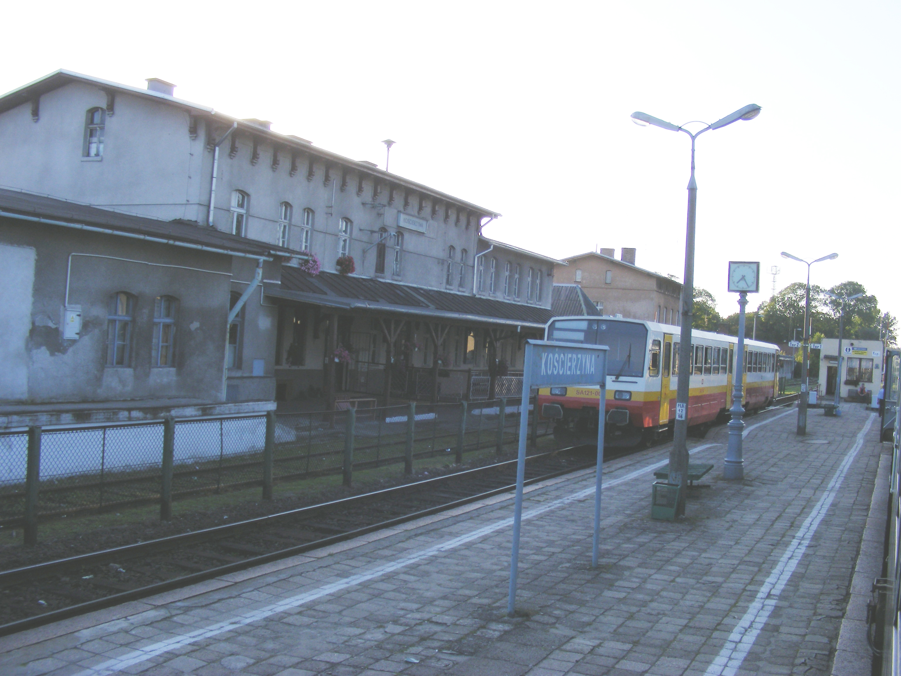 Stacja kolejowa w Kościerzynie (woj. pomorskie)